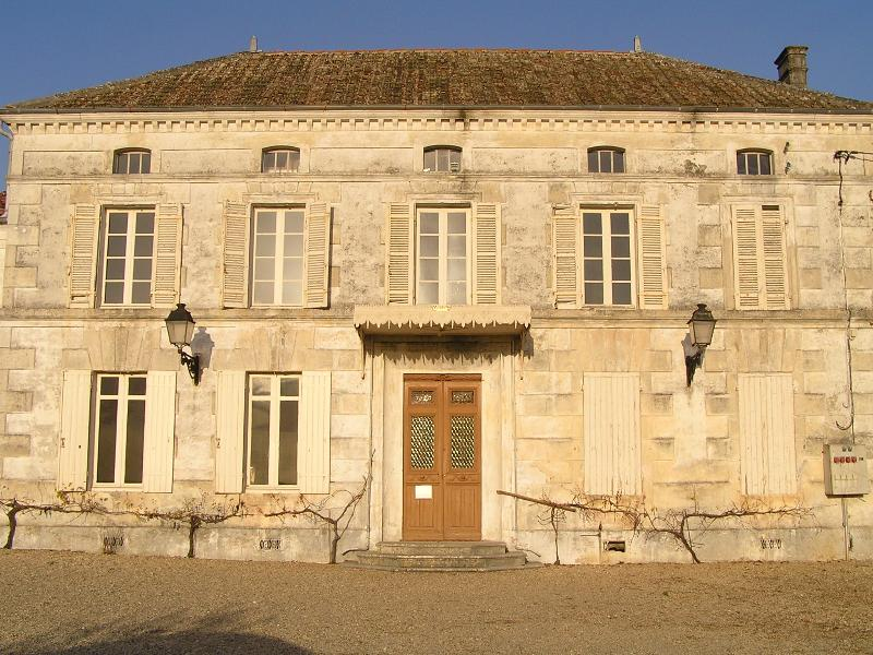 mairie de Brie-sous-Matha